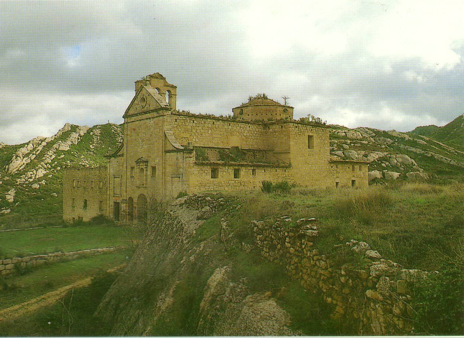 Monasterio del Desierto, Calanda, Teruel, Aragón